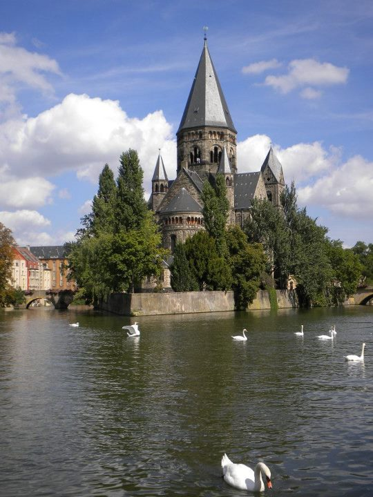 Photographie du temple neuf protestant (XXe s), à Metz (Moselle). .